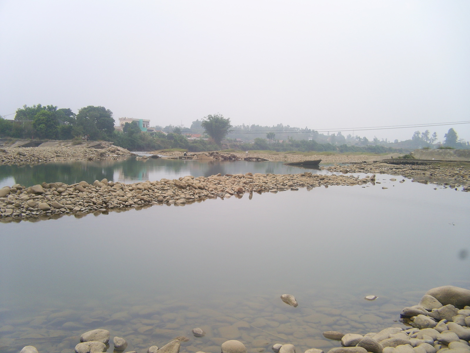 ảnh chụp phong cảnh sông Tài Chi một chiều mùa đông năm 2006. Đây là đoạn đập tràn 2 của Sông Hà Cối hướng Hà Cối - Móng Cái. Hiện nay đã được thay bằng " Cầu mới " Hà Cối